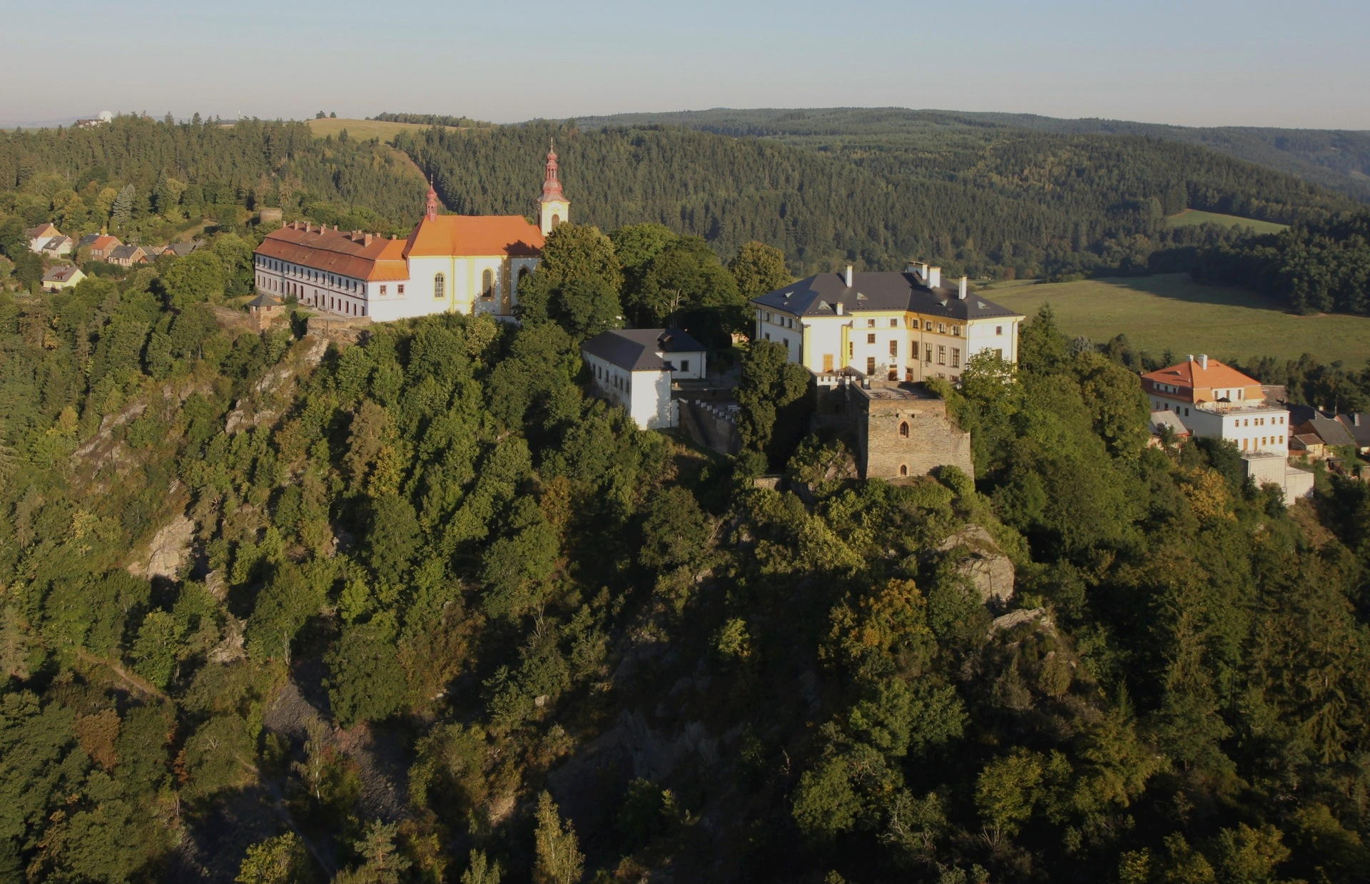 Pohled z nebe na Rabštejn nad Střelou